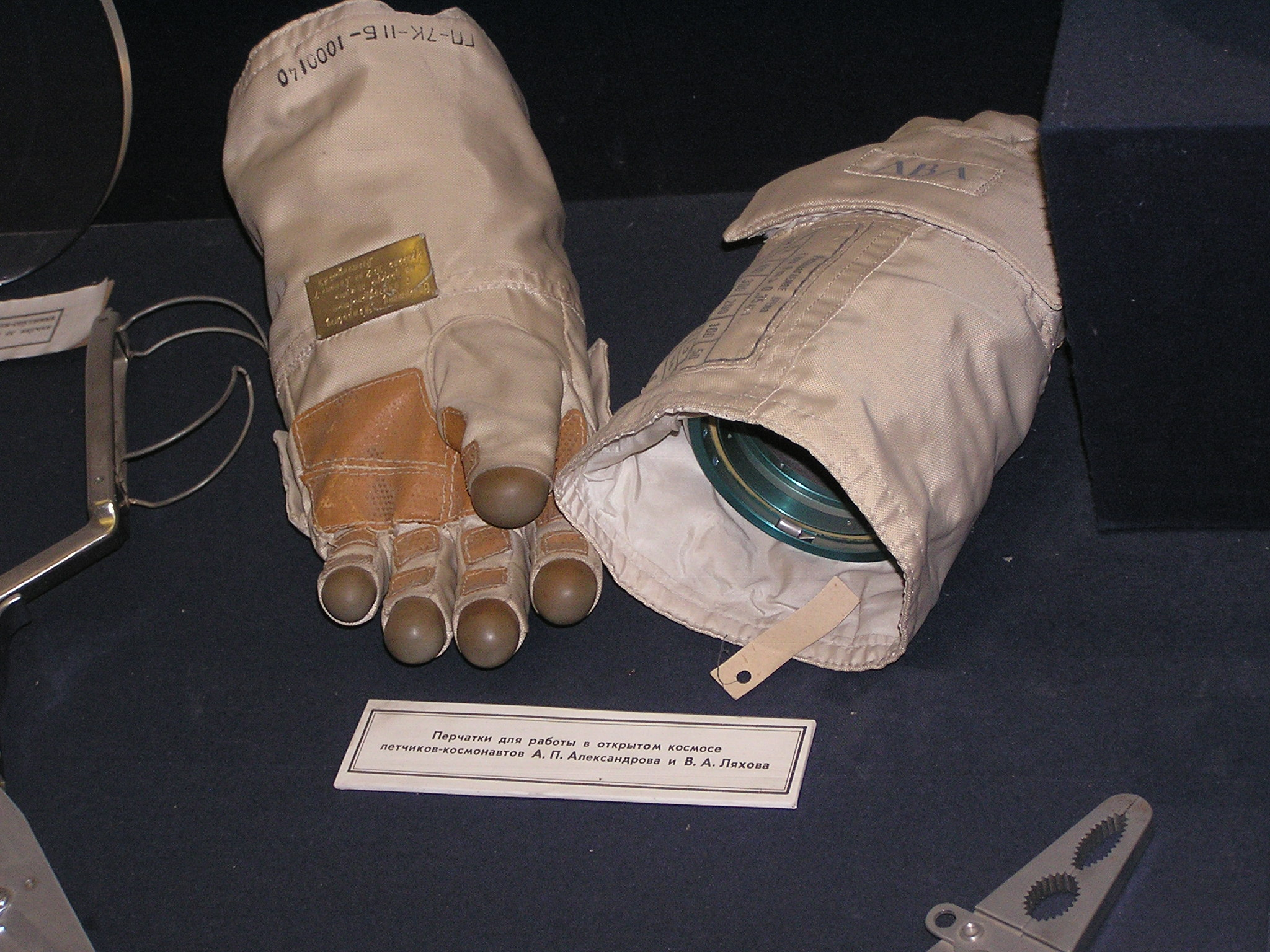 Музей космонавтики и ракетной техники (в Иоанновском равелине Петропавловской крепости). ПЕрчатки для работы в открытом космосе